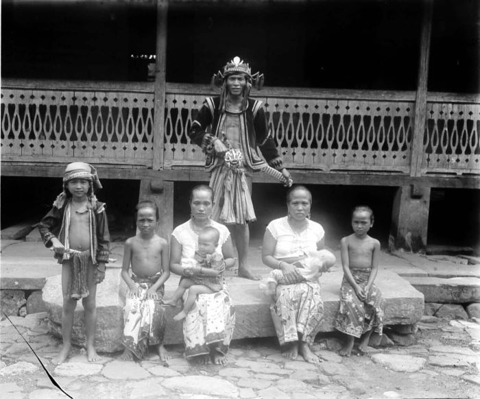 Negatief. Een familie op Nias